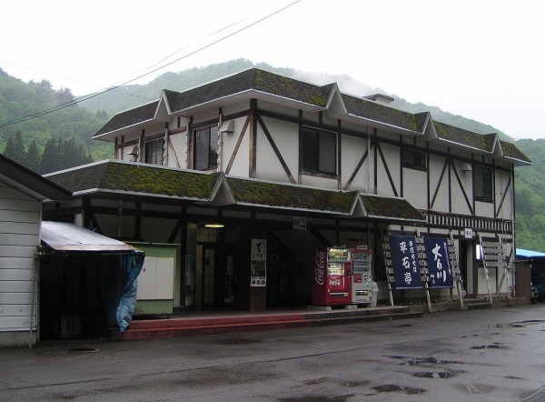 2006年5月28日に投稿者がja:大白川駅で撮影しました。